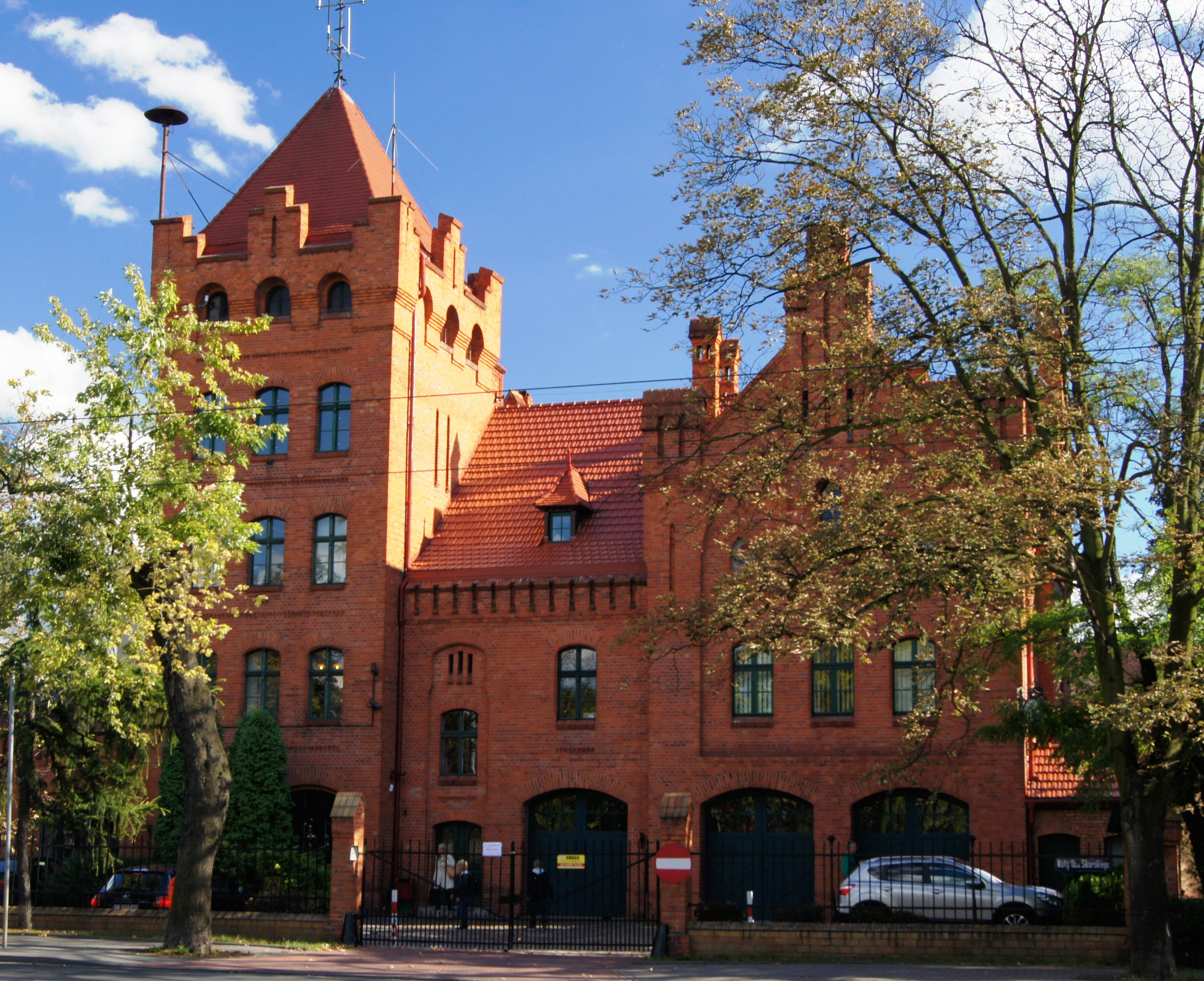 Toruń, ul. Prosta 32 - budynek główny Miejskiej Straży Ogniowej, 1901-1903 (zabytek nr A/87)